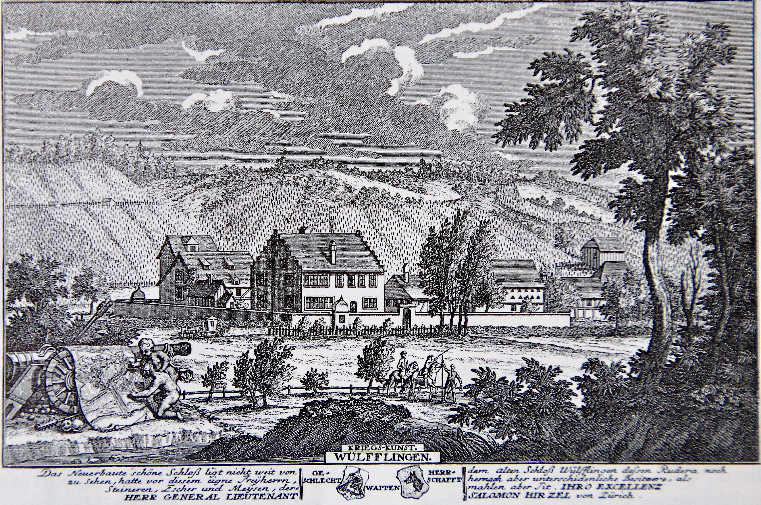 Schloss Wülflingen aus Eidg. Topographie, 1754